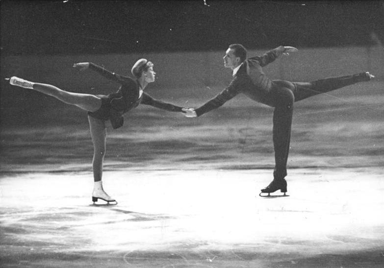 Ludmilla Belousoca, Oleg Protopopow Zentralbild Kohls Qu 15.4.1963 Belouscowa-Protpopow von den Berlinern umjubelt Auch am 14.4.1963, dem zweiten Tag der Internationalen Oster-Eissporttage in der gut besuchten Werner-Seelenbinder-Halle, waren die Vizewelt- und Europameister Belouscowa-Protpopow (UdSSR) die Lieblinge des Berliner Sportpubliums. Belouscowa-Protpopow mußten nach ihrem "Liebestraum" von Liszt und für die modernen Tänze mehrere Zulagen geben. UBz: Belouscowa-Protpopow bei ihrer Kür.